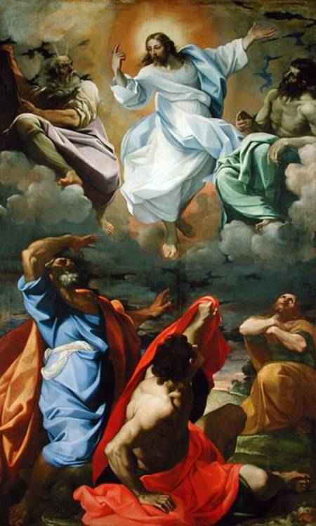 The Transfiguration Lodovico Carracci 1594